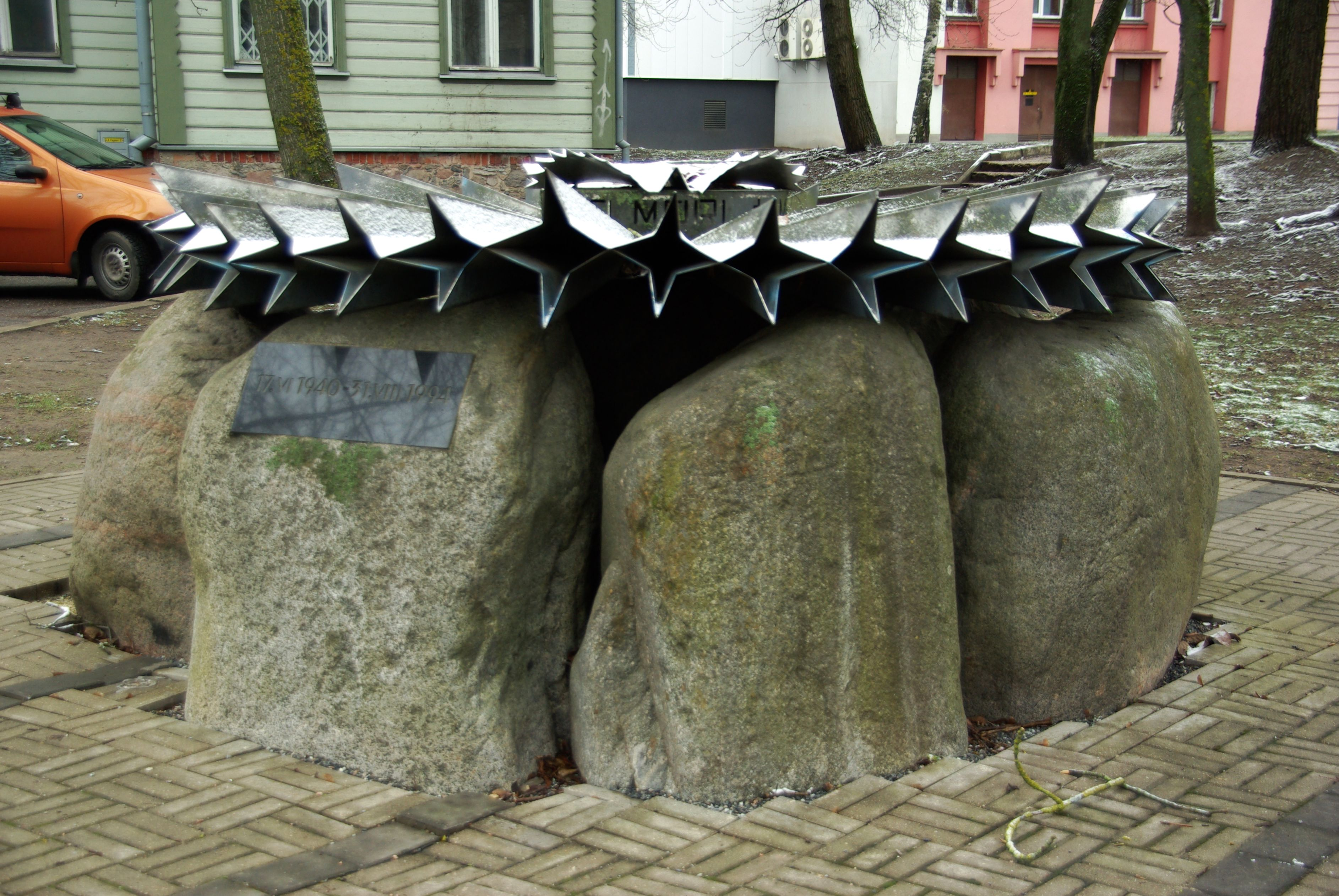 Pepleri 27, Tartu